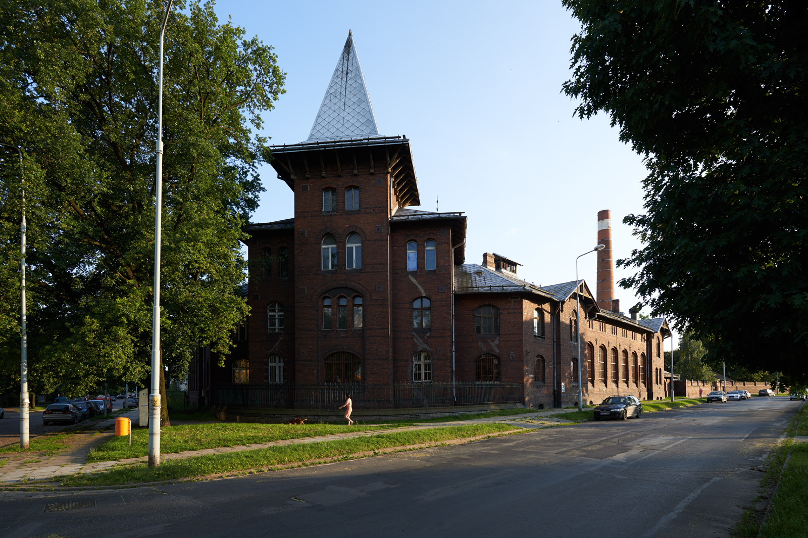 Wybrzeże Conrada-Korzeniowskiego we Wrocławiu: budynek gospodarczy szpitala psychiatrycznego